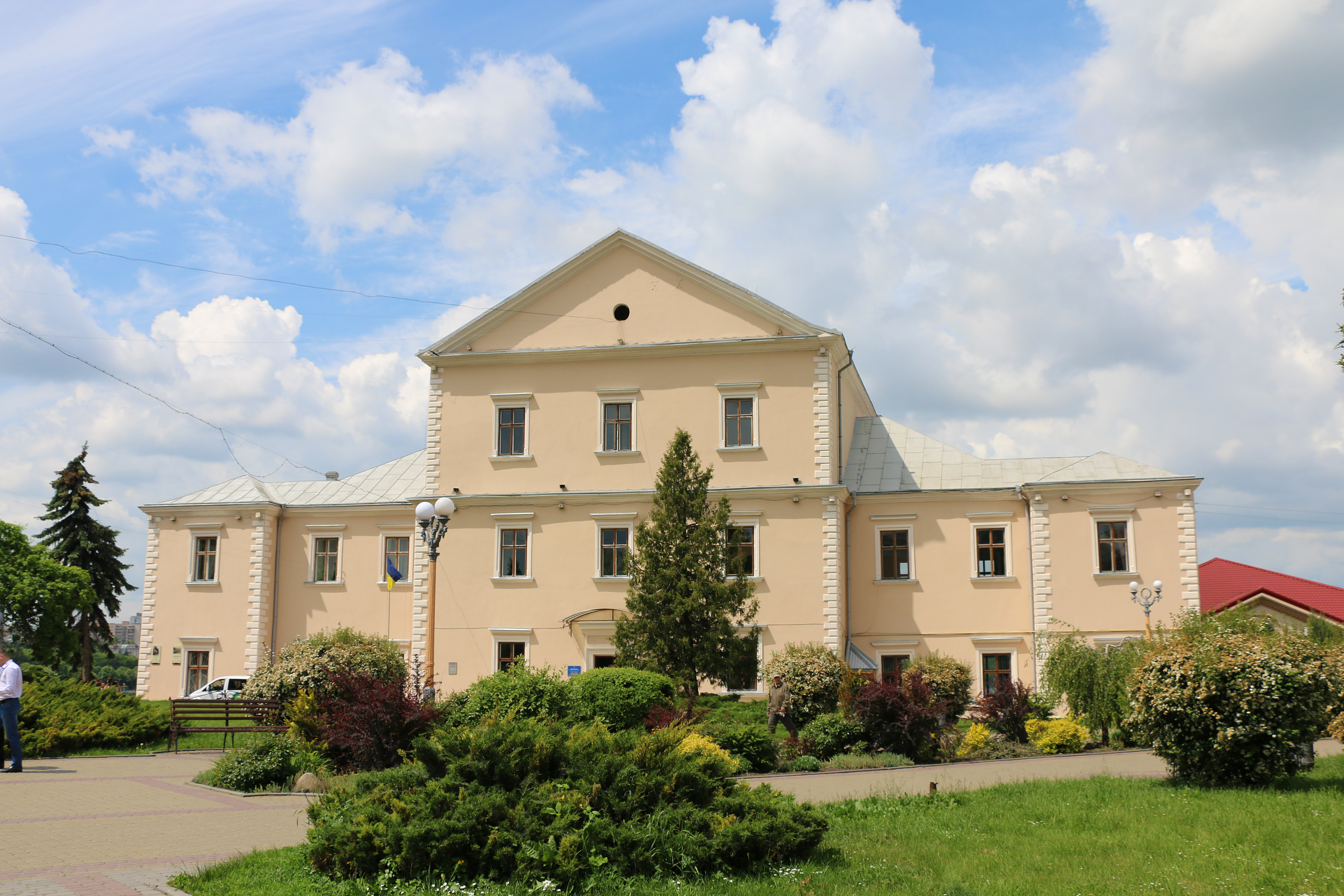 Старий замок, Тернопіль, вул. Замкова, 12